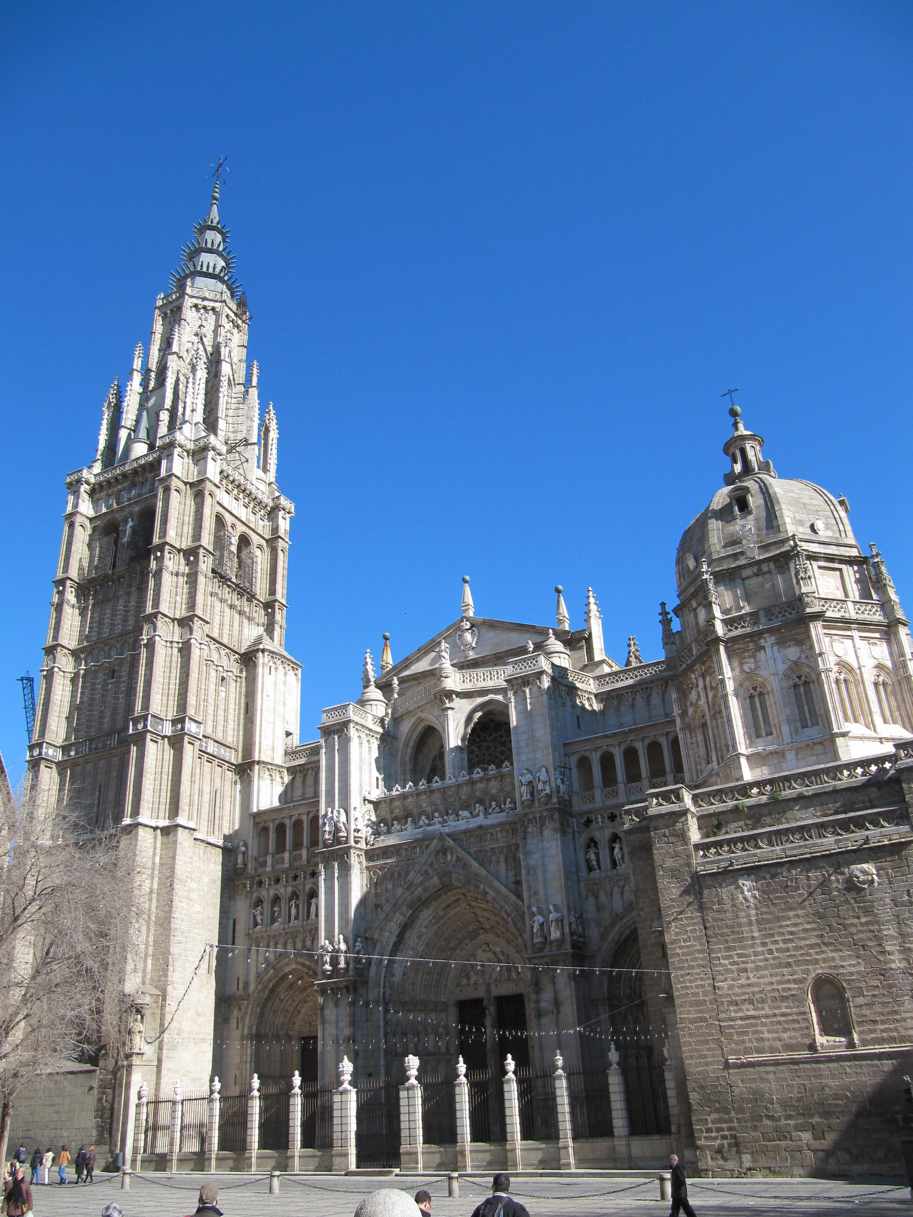 Toledo, Španělsko, katedrála.